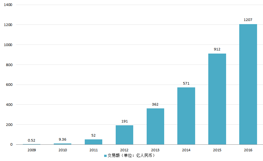 中文（中国大陆）: 2009-2016年阿里巴巴（天猫）11日11日（也被称为双十一购物狂欢节、光棍节）全天交易额变化图示。